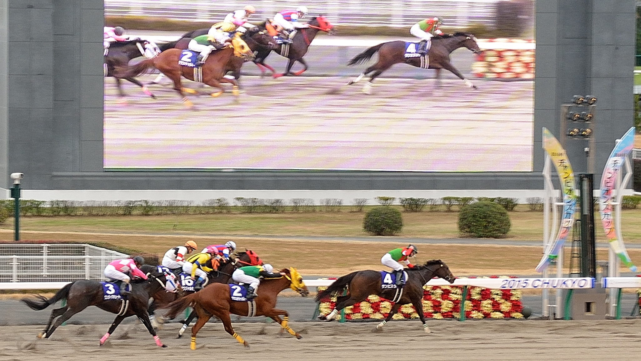 2015年12月6日（日）に中京競馬場で行われた第16回チャンピオンズカップで、2周目ゴール板前の状況を、観客席から撮影したもの。